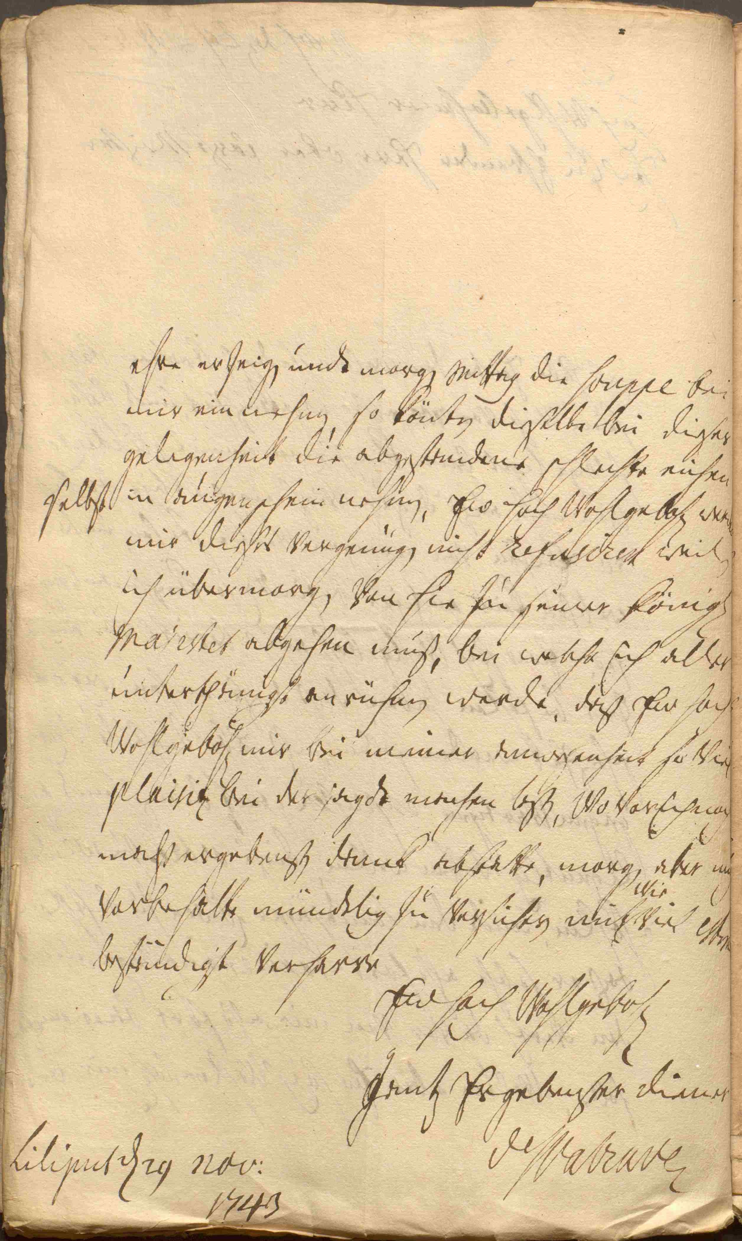 Briefseite des Generalmajor Gerhard Cornelius von Walrave an den Königl. Peußl. Oberforstmeister und Krieges und Domainen Rat Carl Ludwig Plesmann des Herzogtums Magdeburg. Geschrieben in Liliput auf dem Weinberg bei Hohenwarthe Unterschrieben mit Ew. hoch Wohlgebohr. gantz Ergebenster Diener de Walrave